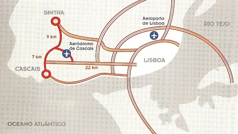 Localização aeródromo de tires